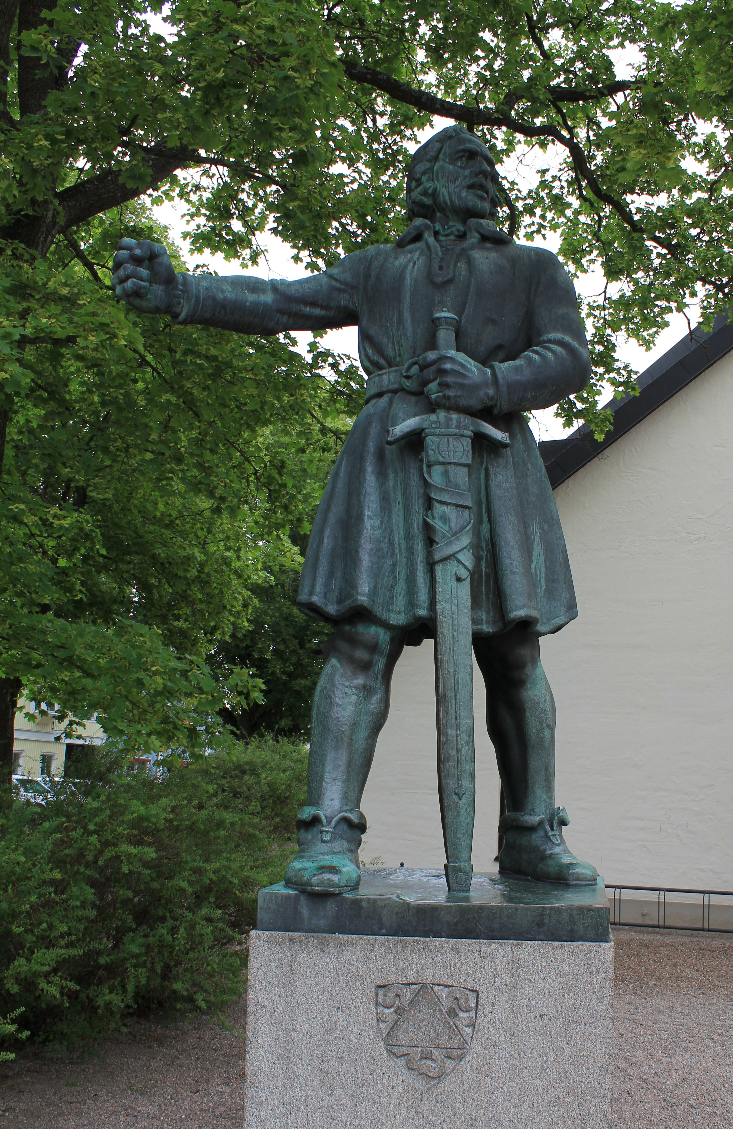 Engelbrekt Engelbrektsson skulpterad av Carl Eldh. Rest utanför Heliga Trefaldighets kyrka i Arboga vid Riksdagens 500-årsjubileum 1935.